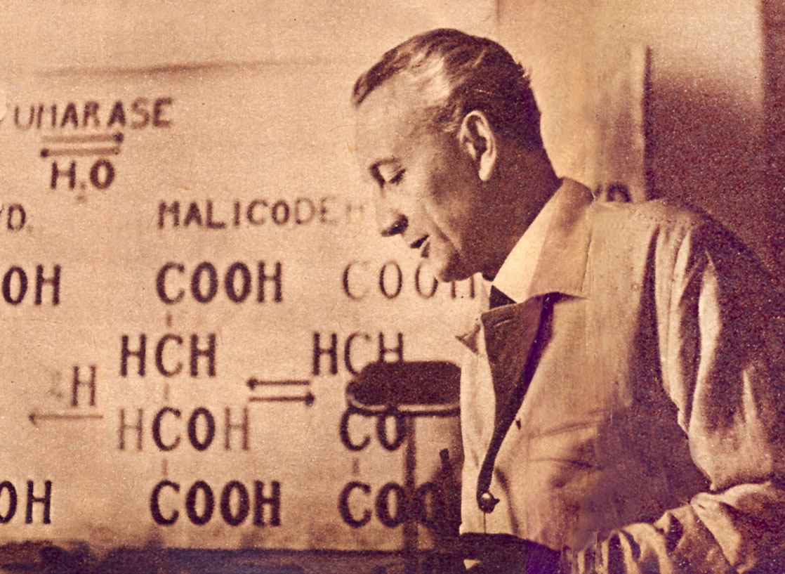 Szent-Györgyi Albert előadás közben, mögötte az általa kutatott citrátkör egy részlete látható. Szeged.